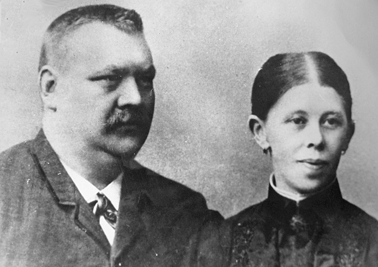 Wilhelm und Sofie Mestemacher, Gründer der Bäckerei Mestemacher in Gütersloh